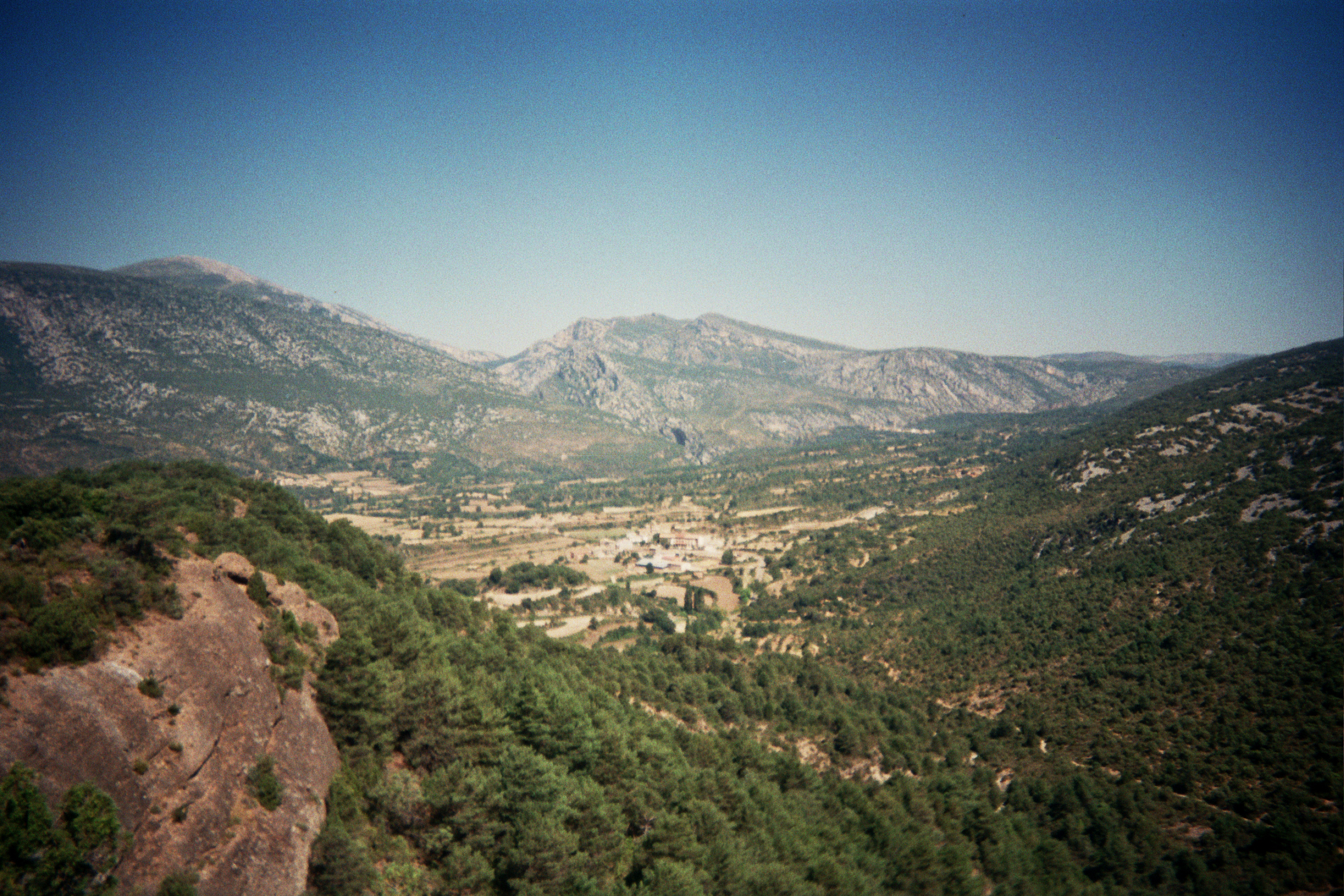 Aragonés: Sierra de Guara